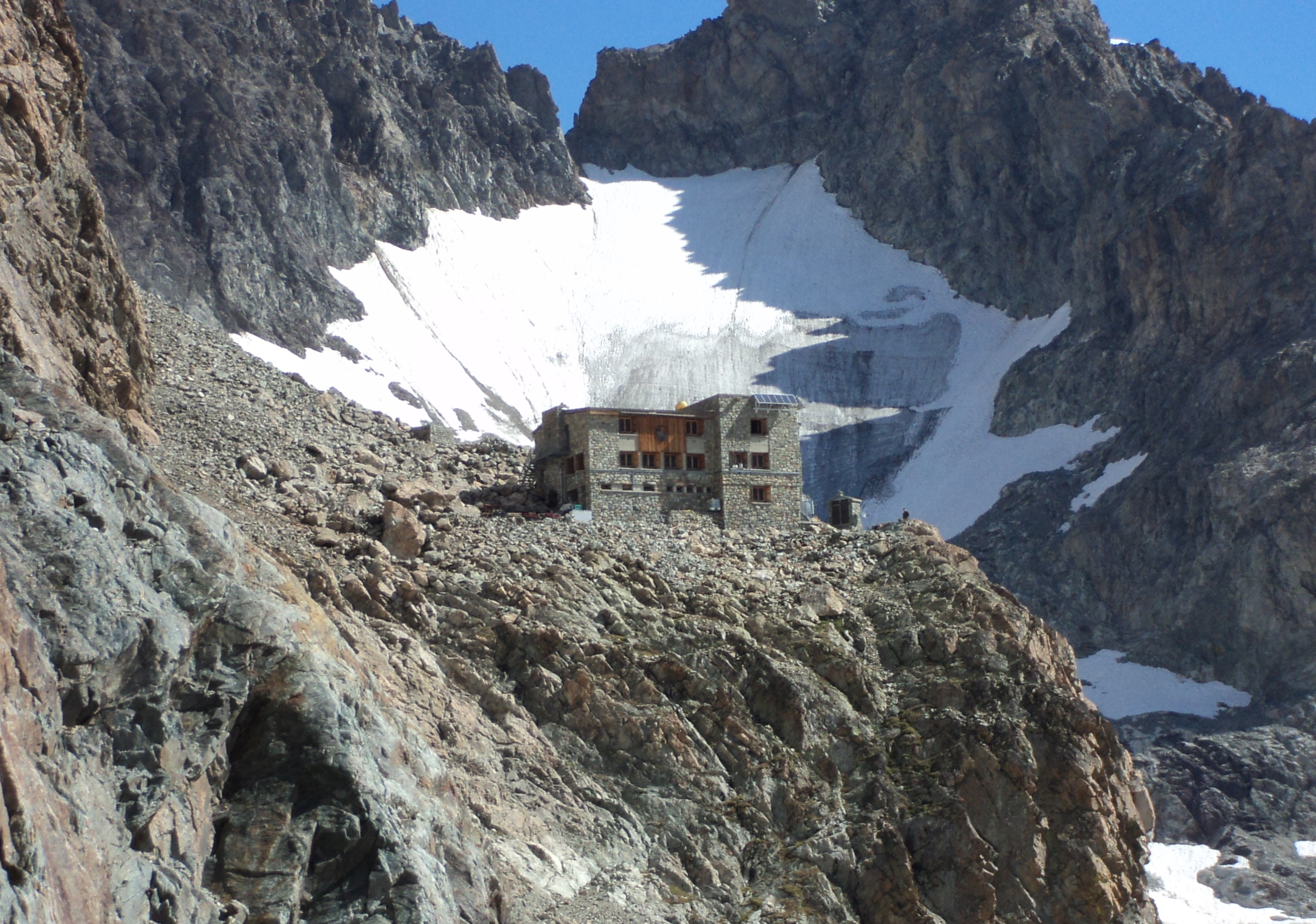 Il rifugio des Écrins (3.175 m) nel massiccio des Écrins.